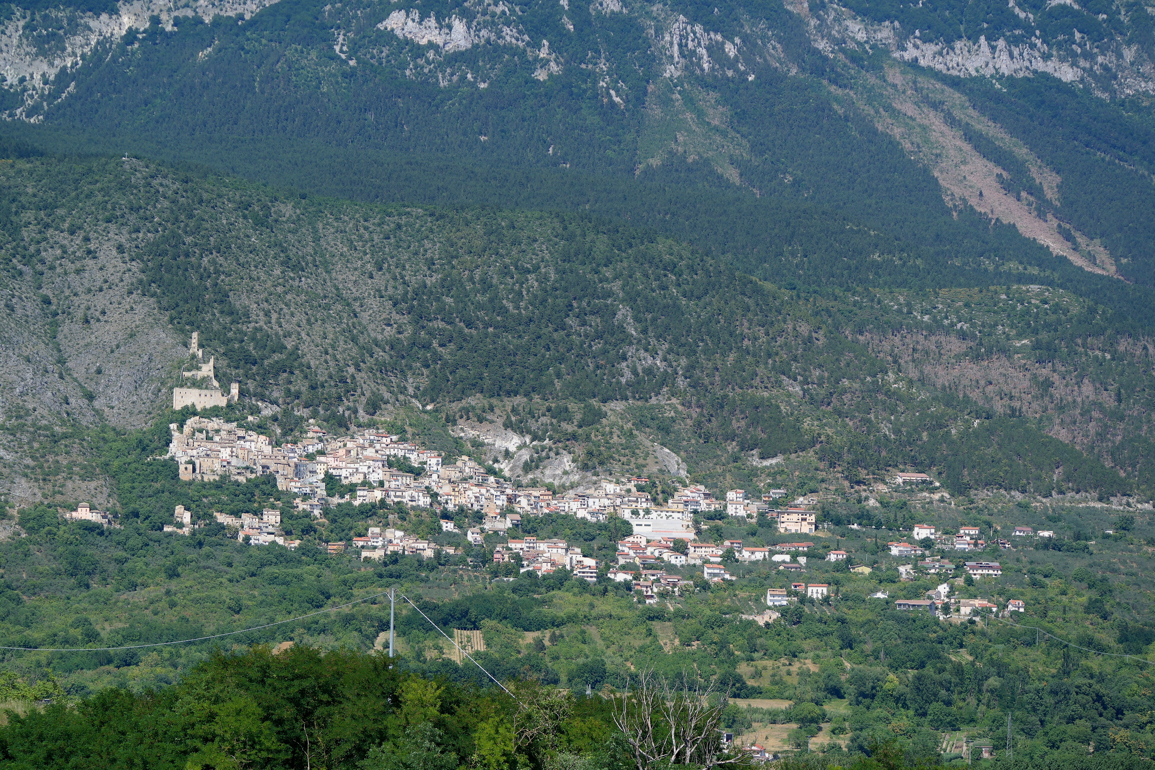 Panorama di Roccacasale